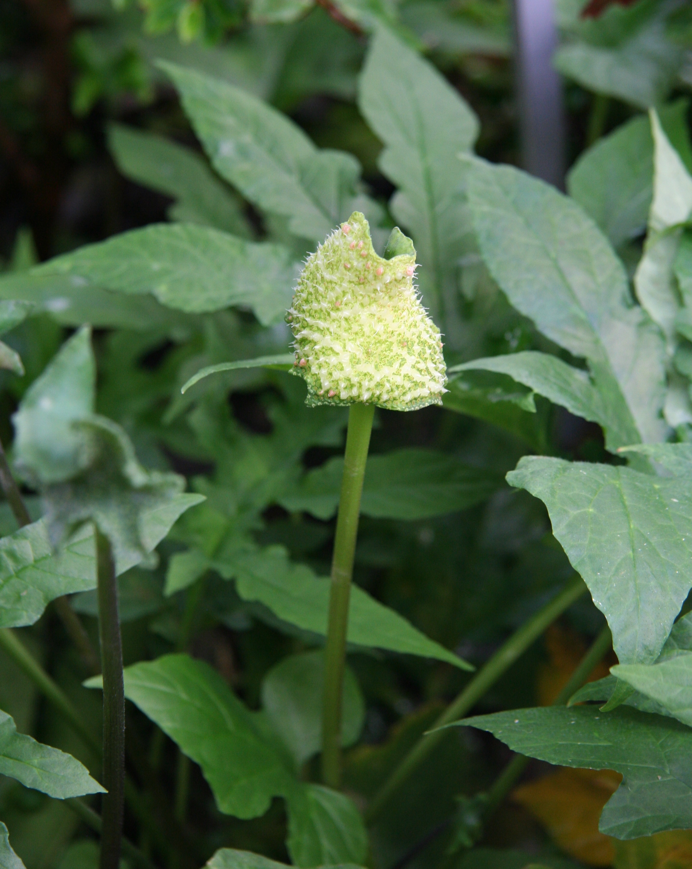 Dorstenia contrajerva im Botanischen Garten Dresden